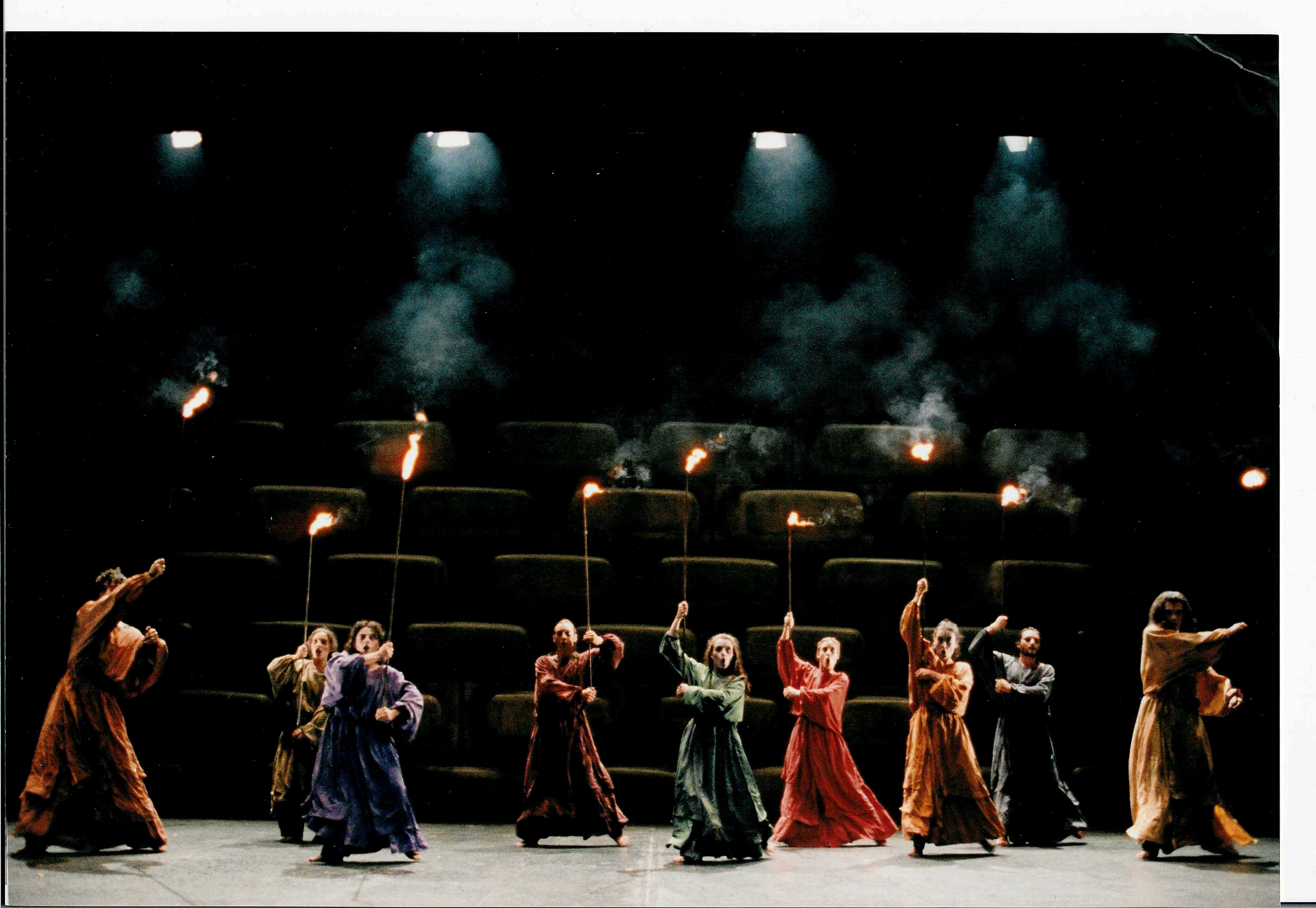 Fotografía